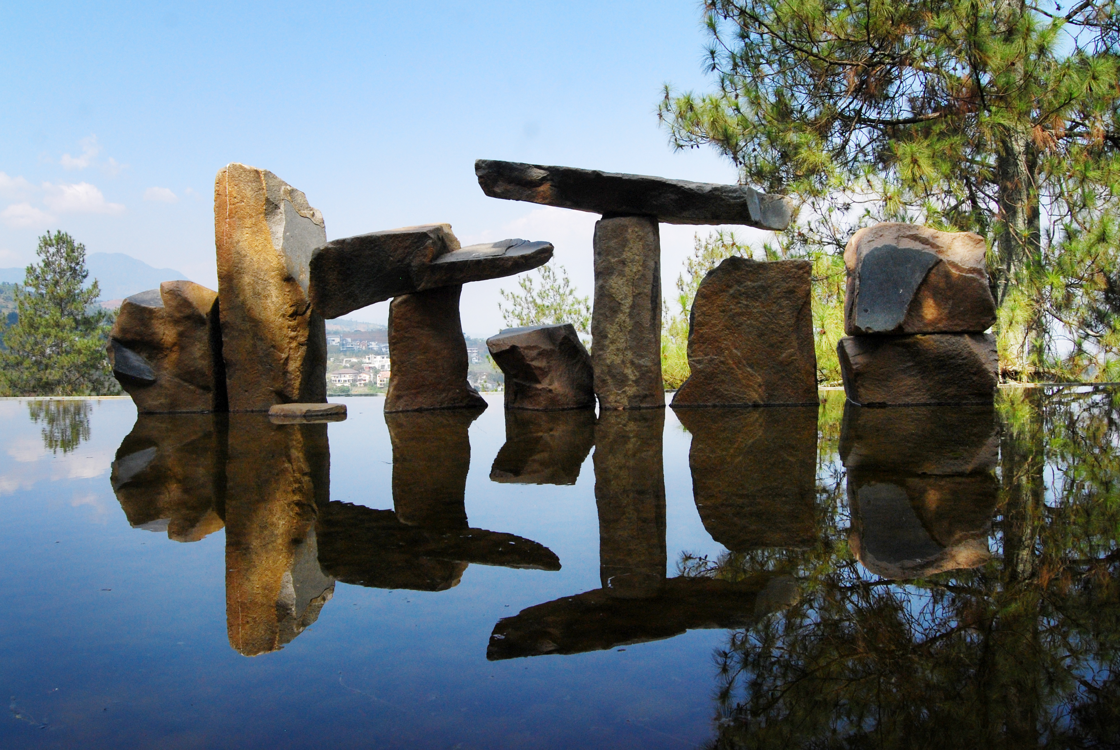 Tampilan Instalasi di Wot Batu